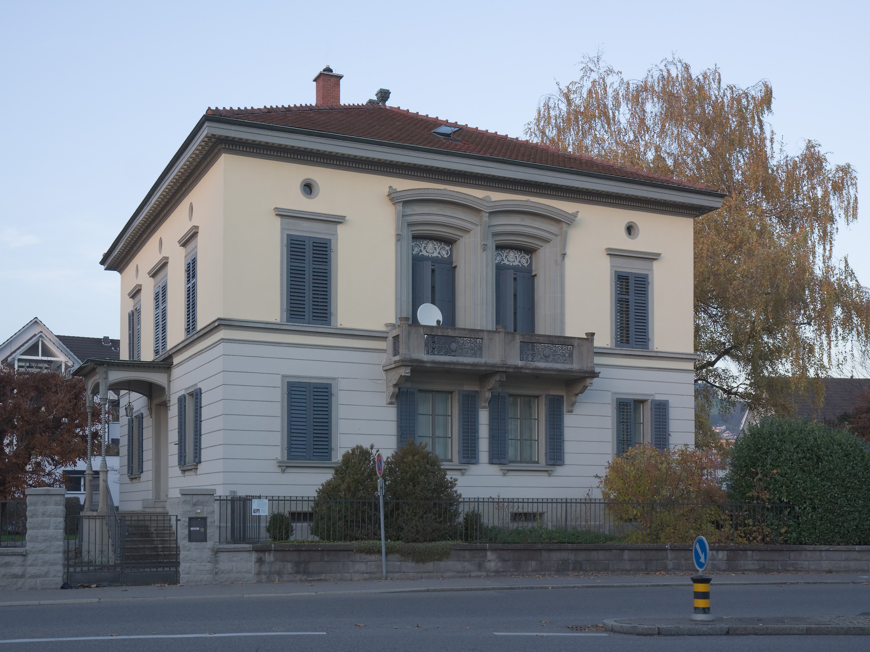 Villa von Architekt Ferdinand Stadler in Stäfa, Schweiz. Erbaut 1850 für J.J. Weber, Färbereibesitzer